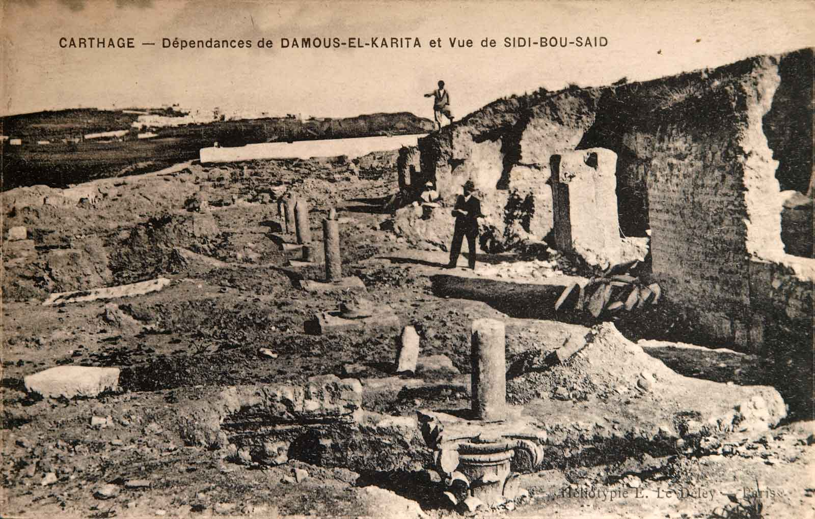 ruines de la basilique de Damous el Karita